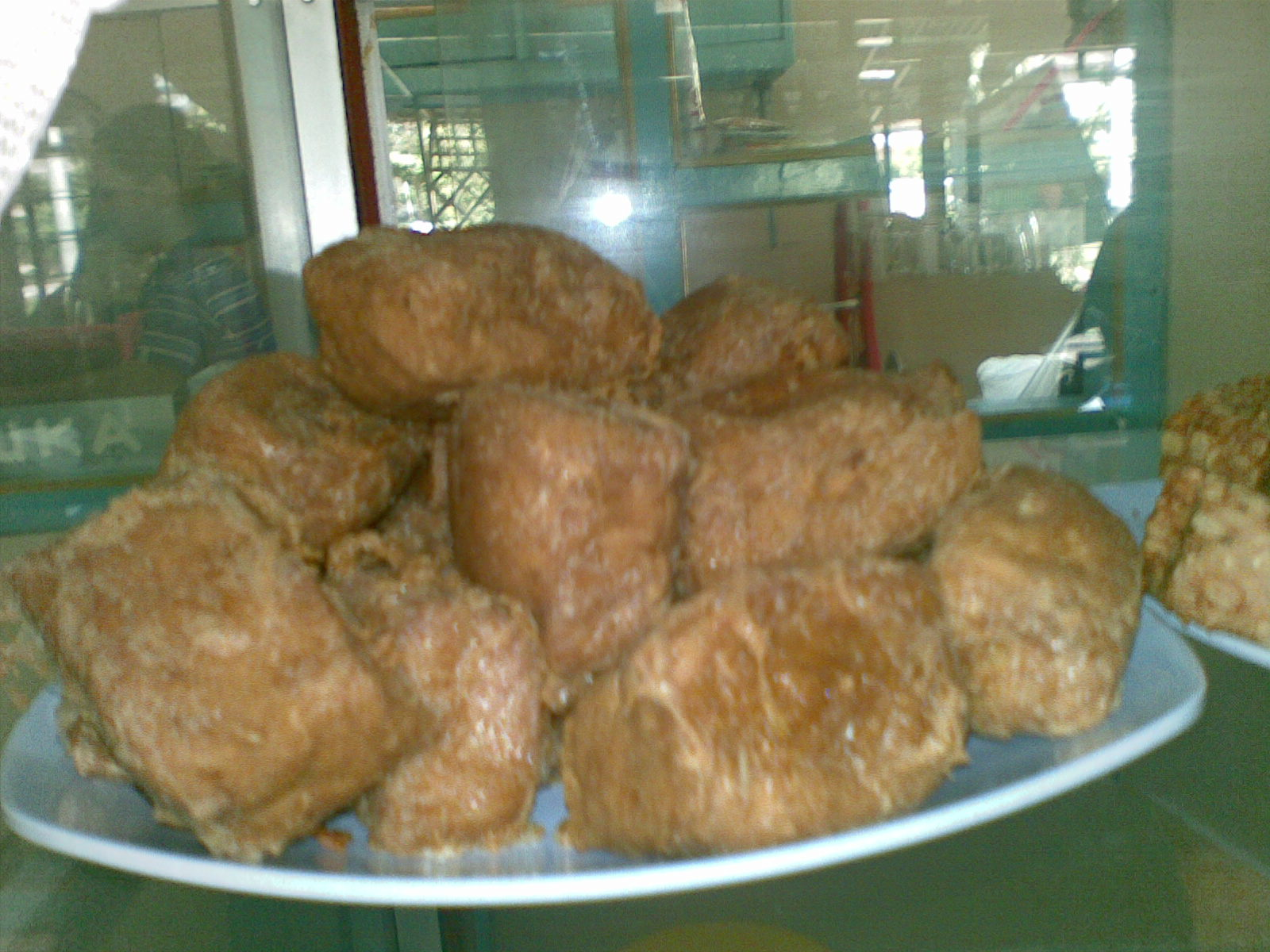 Basa Jawa: Tahu bakso-makanan khas ungaran